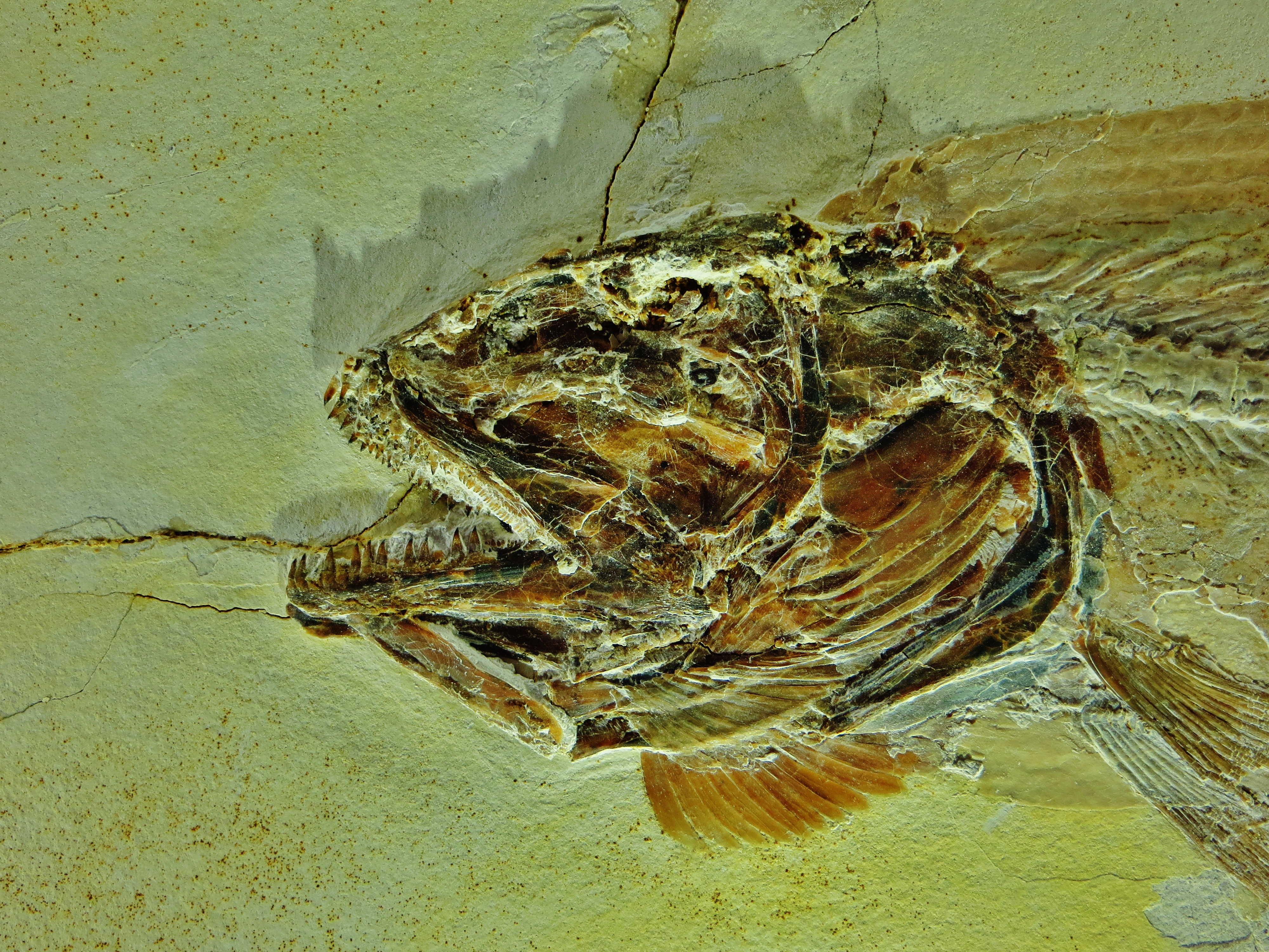 Took the picture at Jura-Museum, Eichstaett